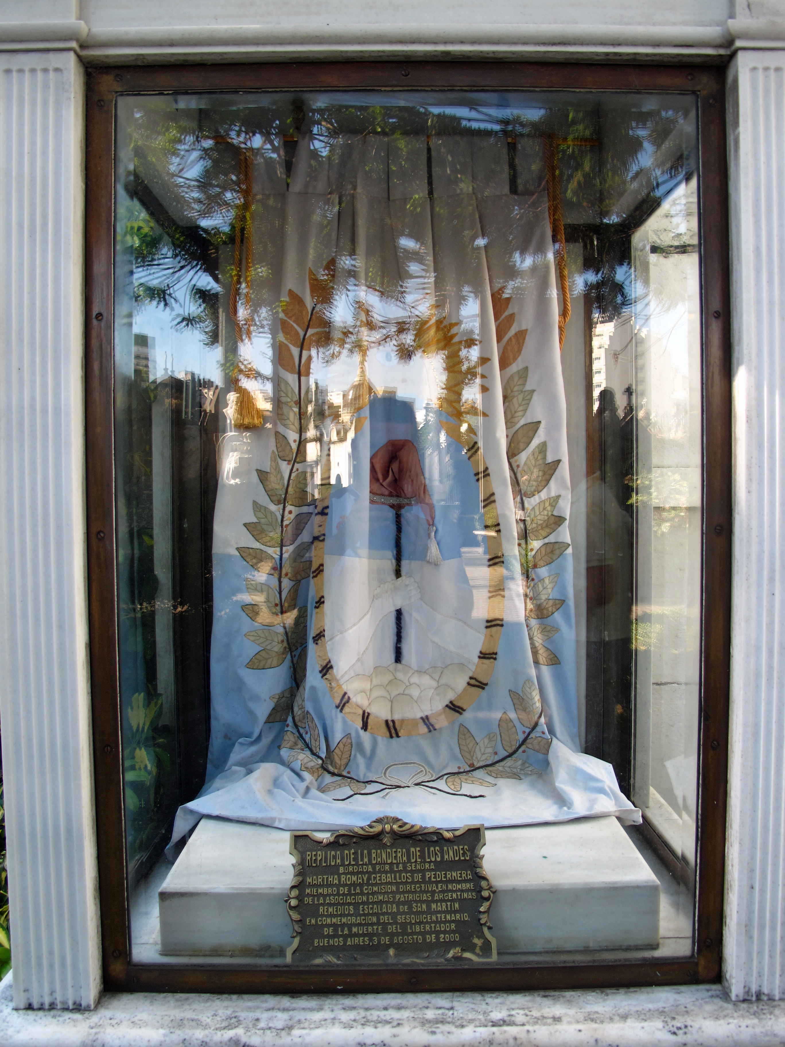 Replica de la bandera utilizada por el ejercito de Los Andes situada en el cementerio de la Recoleta de Buenos Aires